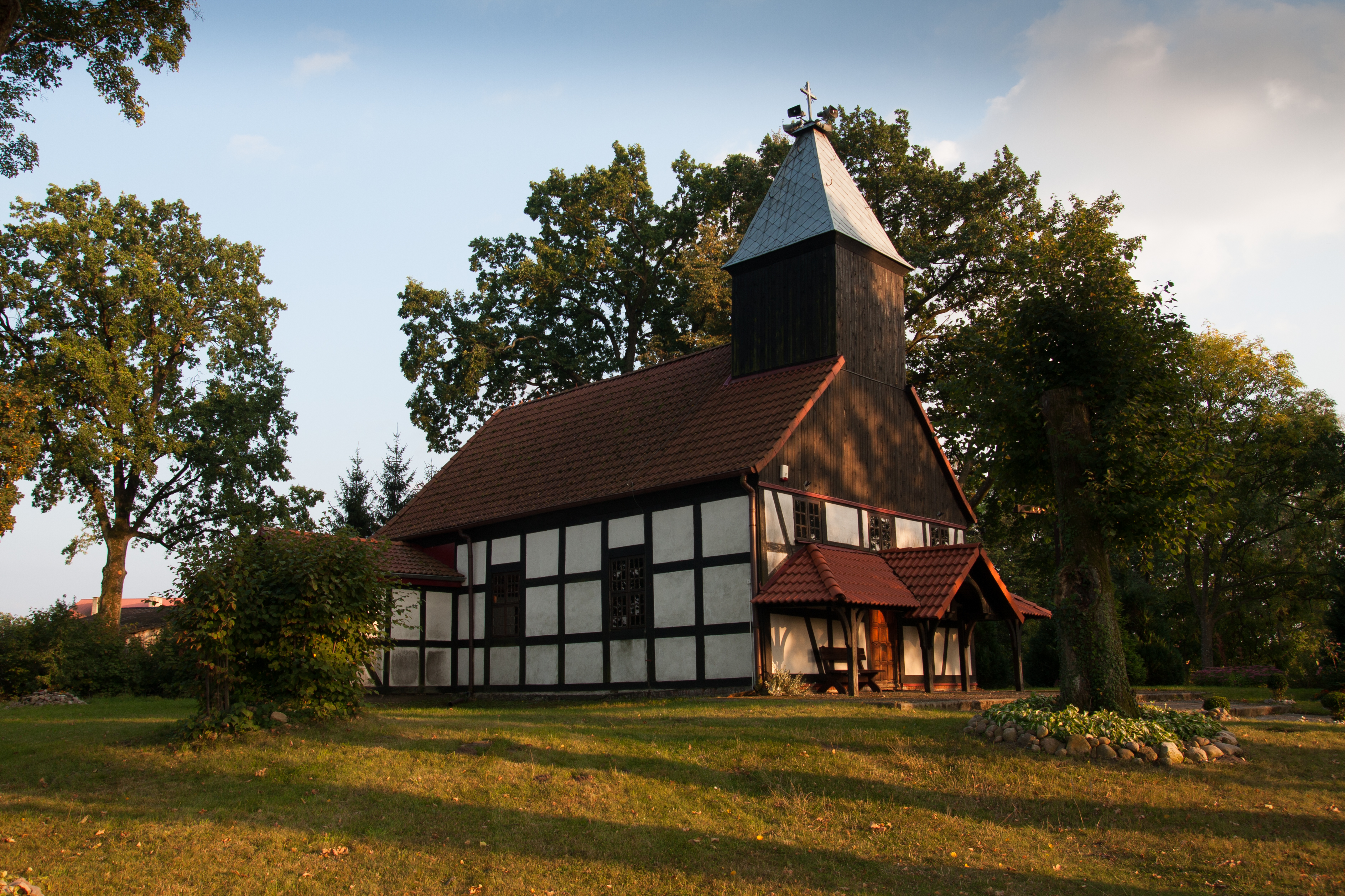 Miłocice - dawny kościół ewangelicki, obecnie rzymskokatolicki filialny p.w. św. Michała Archanioła, 1771